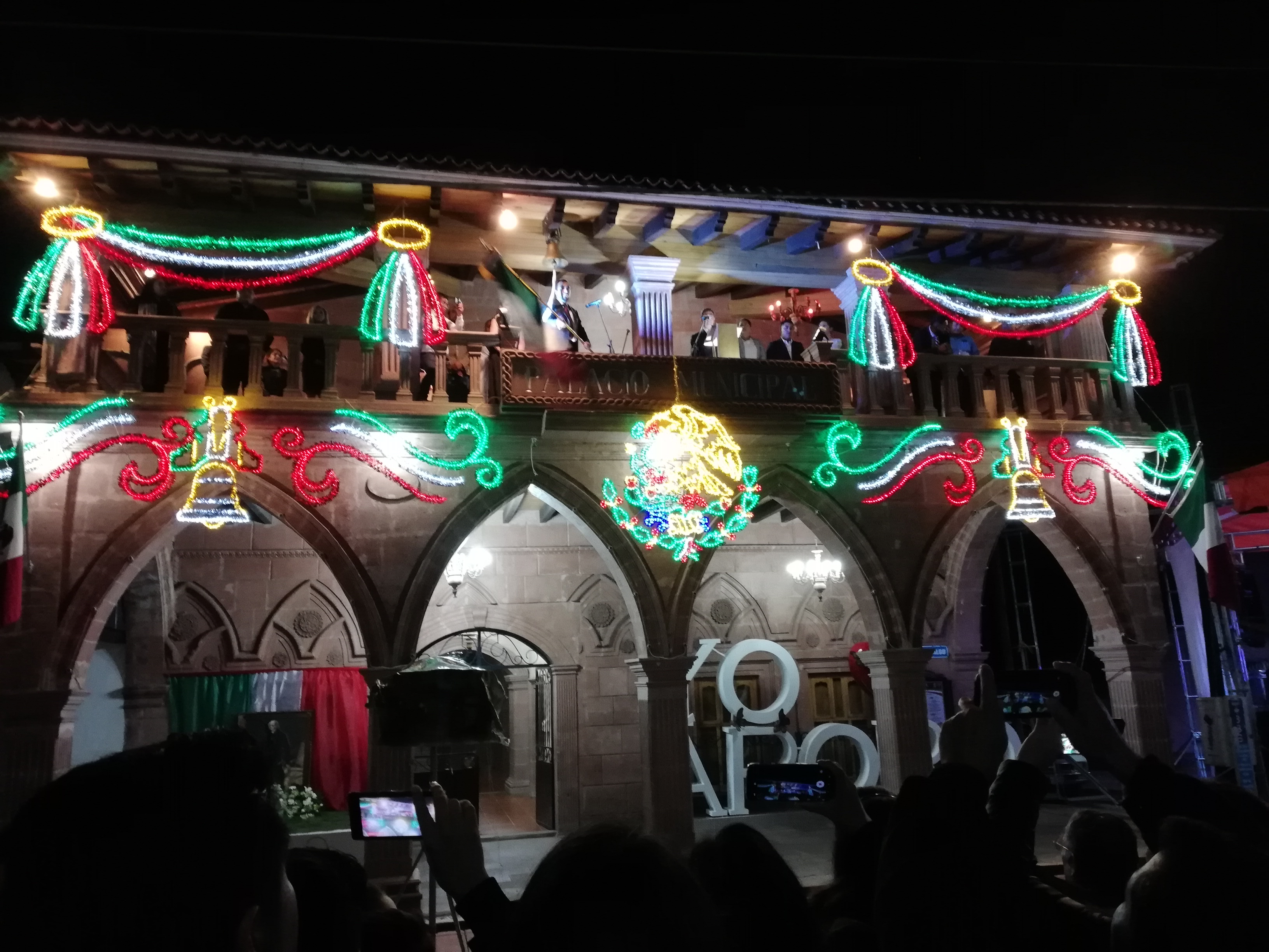 Es una celebración conmemorativa del día de la independencia de México con adornos coloridos y extravagantes en la presidencia del municipio de Aporo, Michoacán de Ocampo